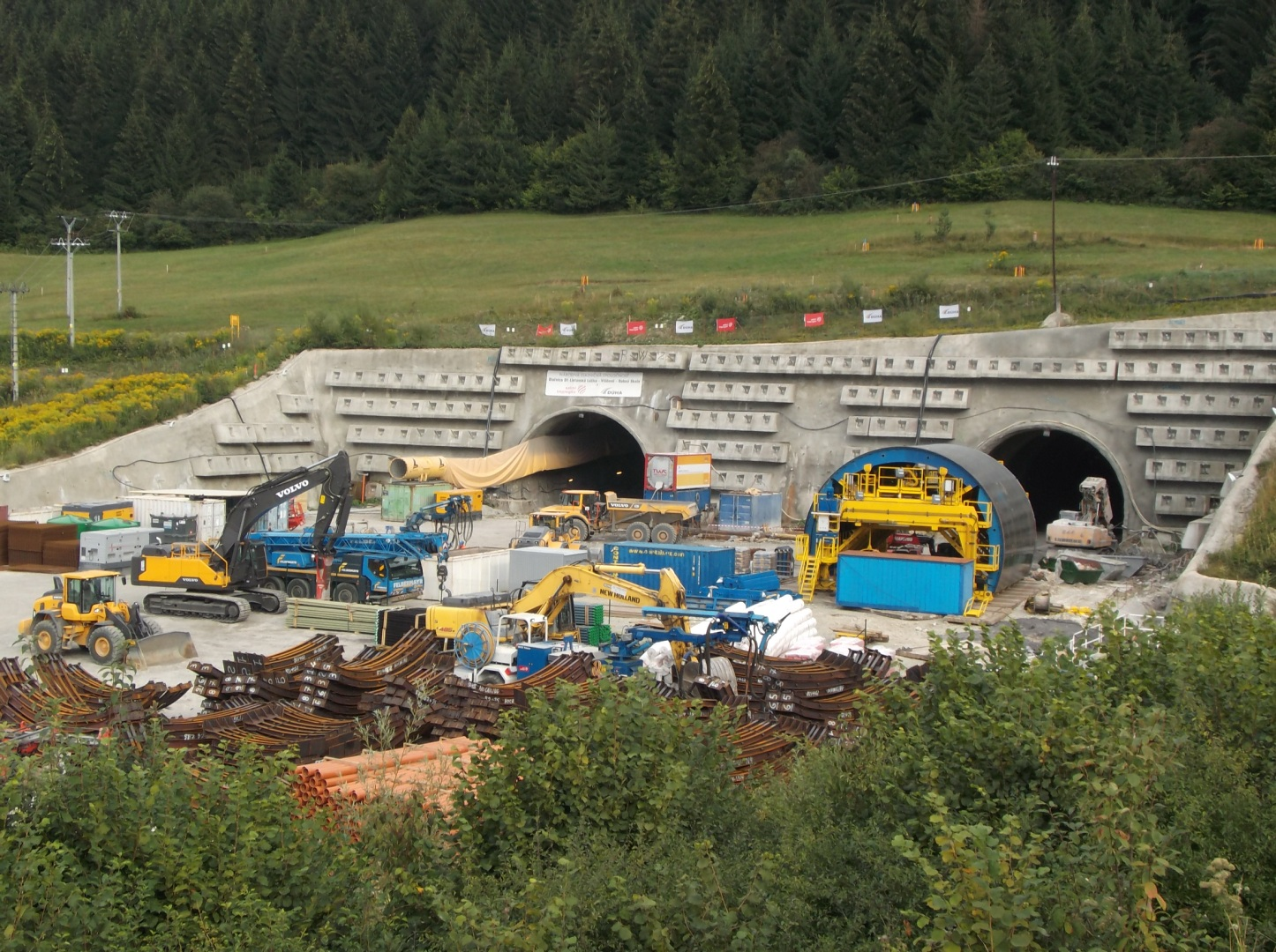 tunel visnove